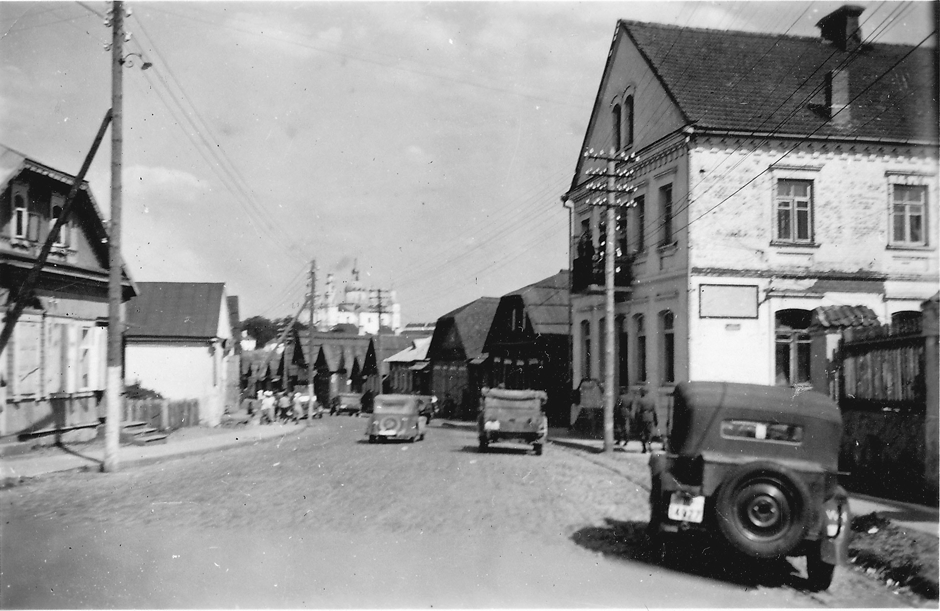 Беларуская (тарашкевіца): Глыбокае (Hłybokaje), вуліца Замкавая (vulica Zamkavaja)